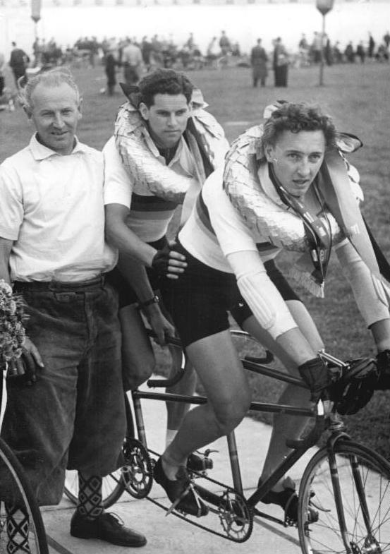 Nietschke, Joachim Popke Zentralbild Wendorf 23.7.1956 DDR-Meisterschaften der Bahnfahrer in Berlin-Weissensee Vom 22.7. bis 28.7.1956 finden auf der Radrennbahn in Berlin-Weissensee die Meisterschaften der Deutschen Demokratischen Republik im Bahnfahren statt. Zum ersten Male haben die Radsportfreunde damit Gelegenheit, die Bahnmeisterschaften in Berlin mitzuerleben. UBz: Die neuen Meister im Tandemmalfahren Rolf Nitzsche-Joachim Popke (SC Dyn. Berlin) mit ihrem Betreuer.